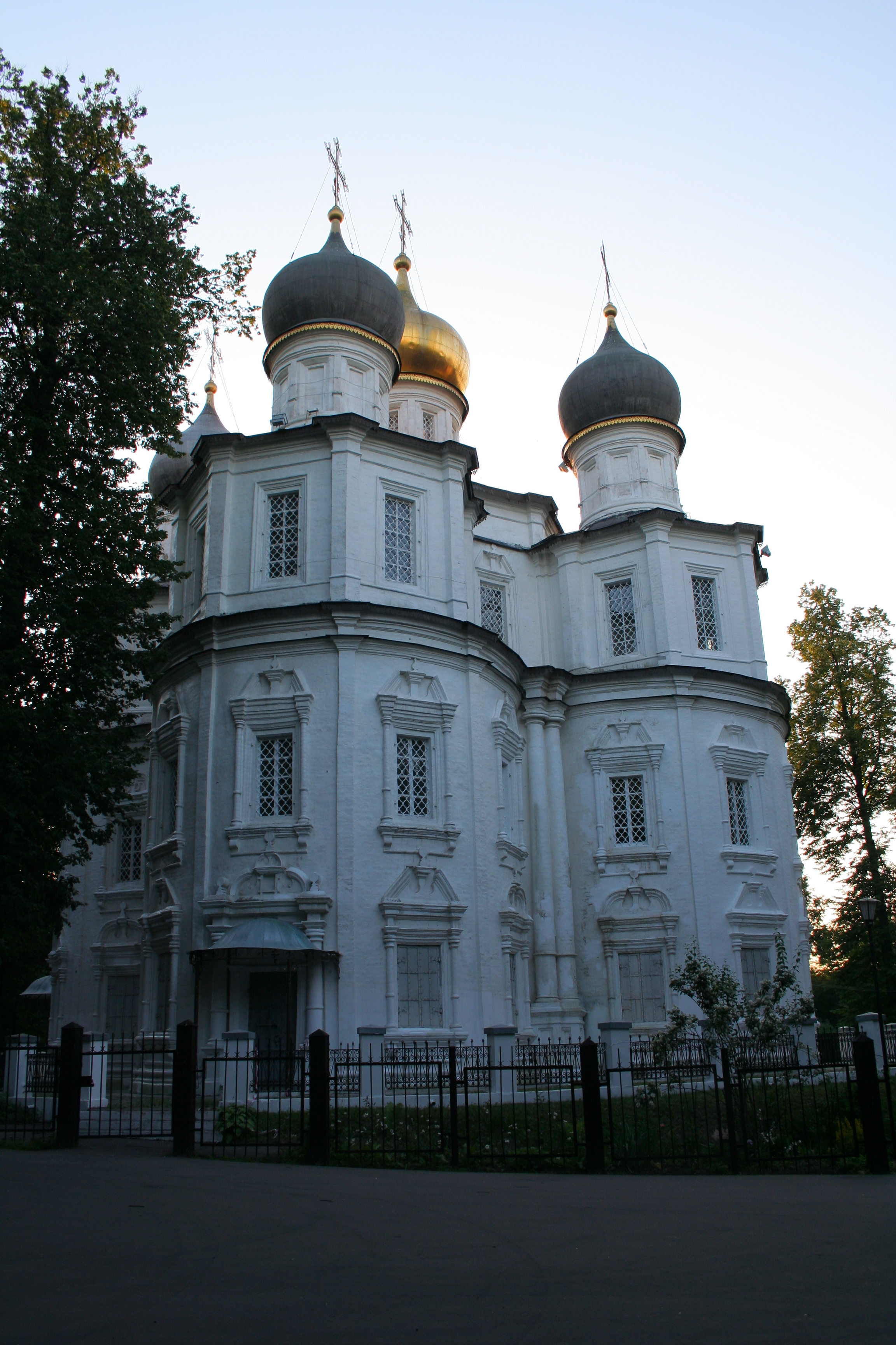 Kirche der Gottesmutter-Ikone von Kasan zu Uskoje, Moskau.